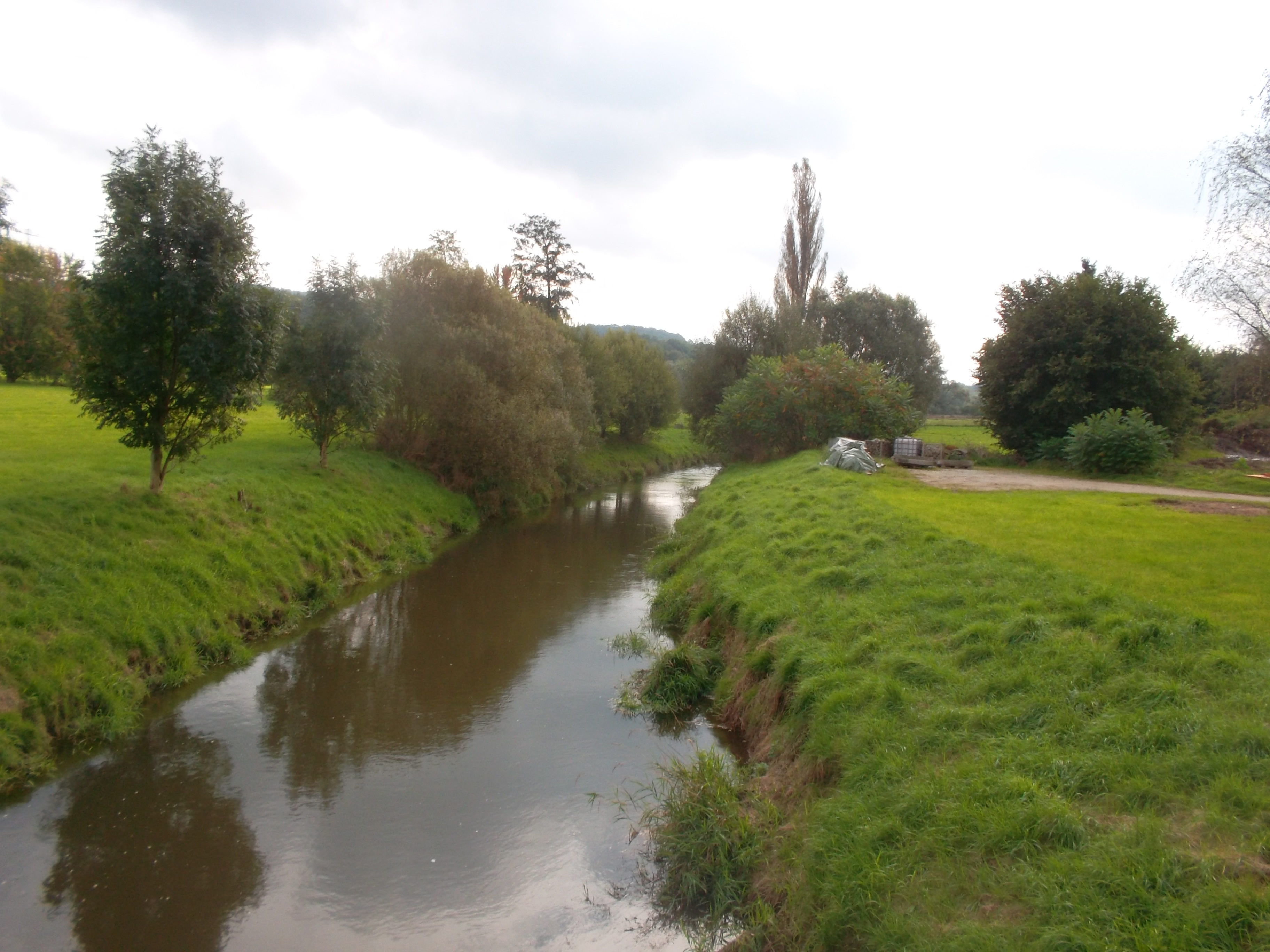 die Spree durch den Kirschauer Ortsteil Bederwitz